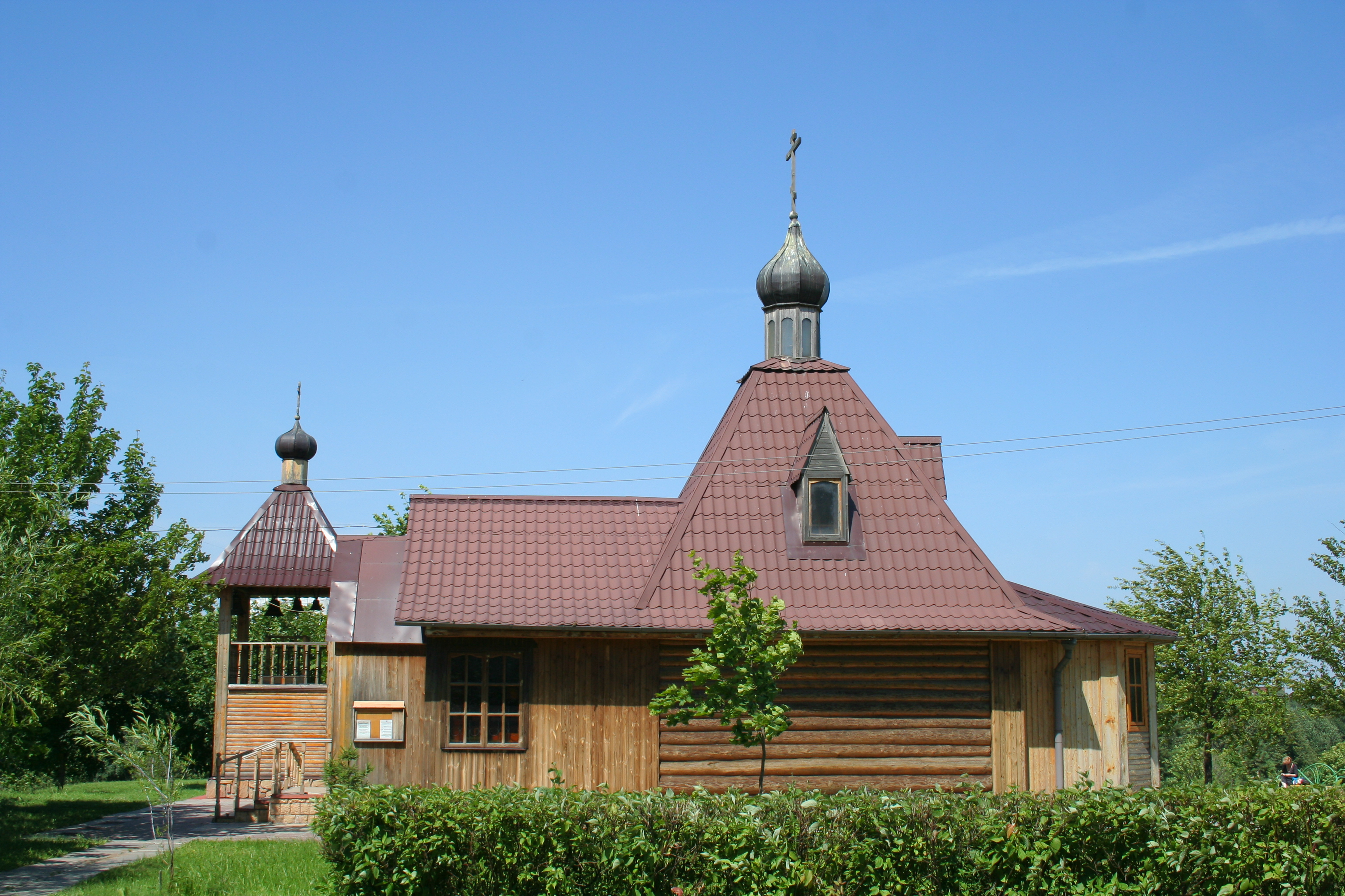 Kirche des Hl. Fürsten Dmitri Donskoi zu Sadowniki, Moskau.